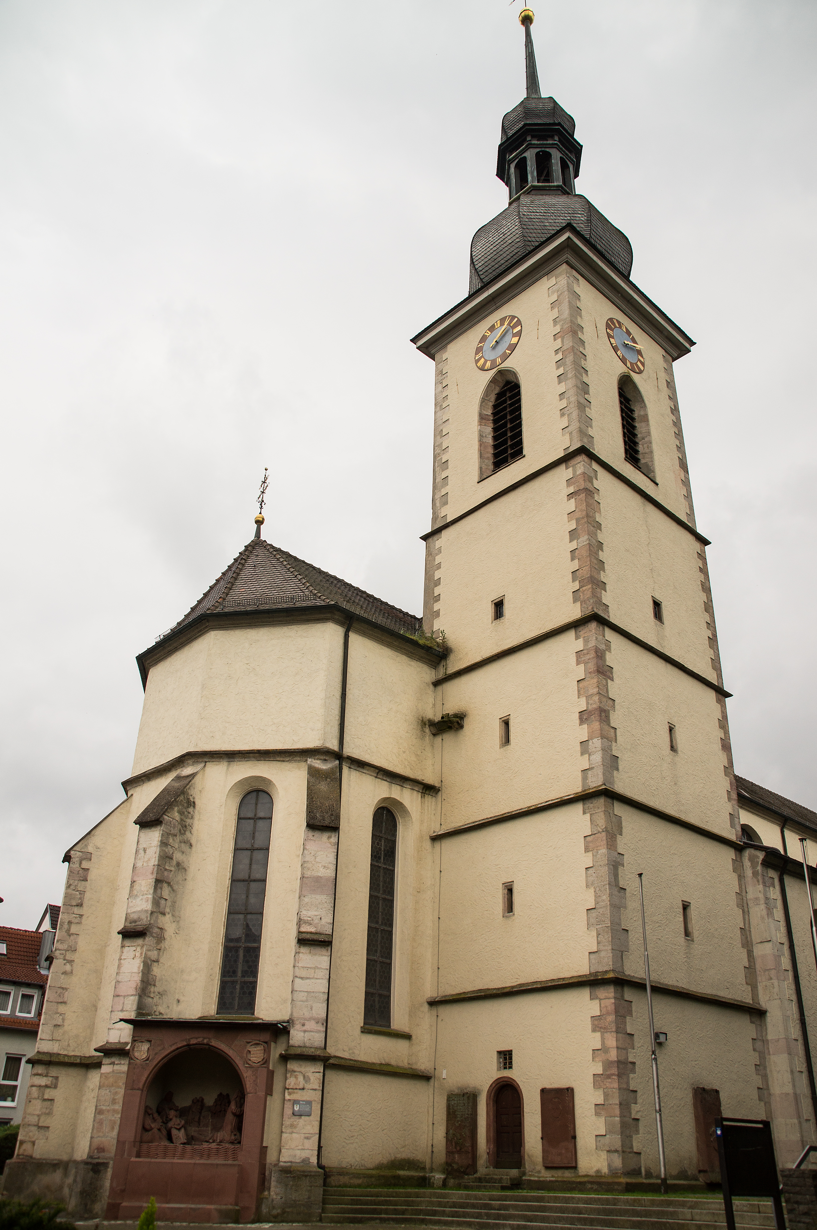 St. Jakobus Kirche Lauda